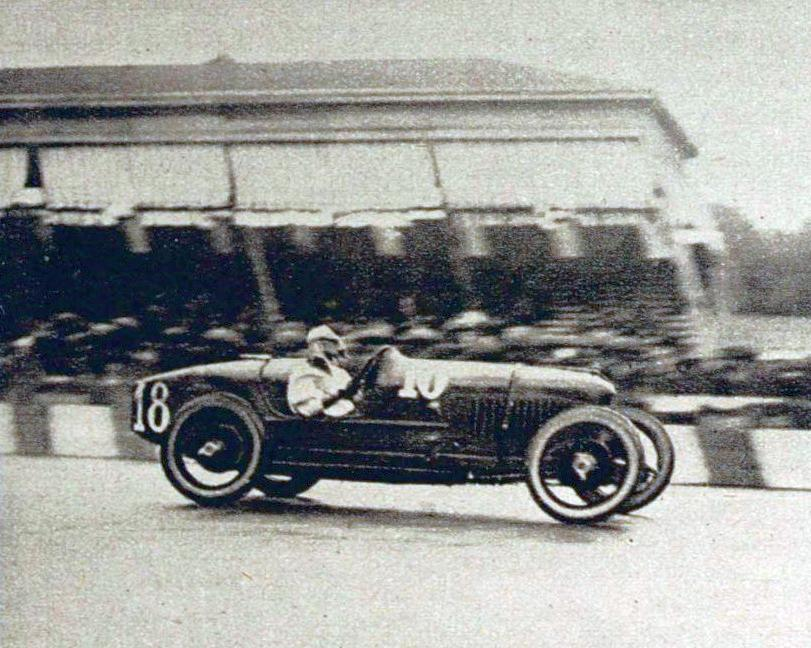 Pietro Bordino, vainqueur du Grand Prix d'Italie 1922 (voiture ET voiturette) 2 Le Monde illustré du 16 septembre 1922, p.243